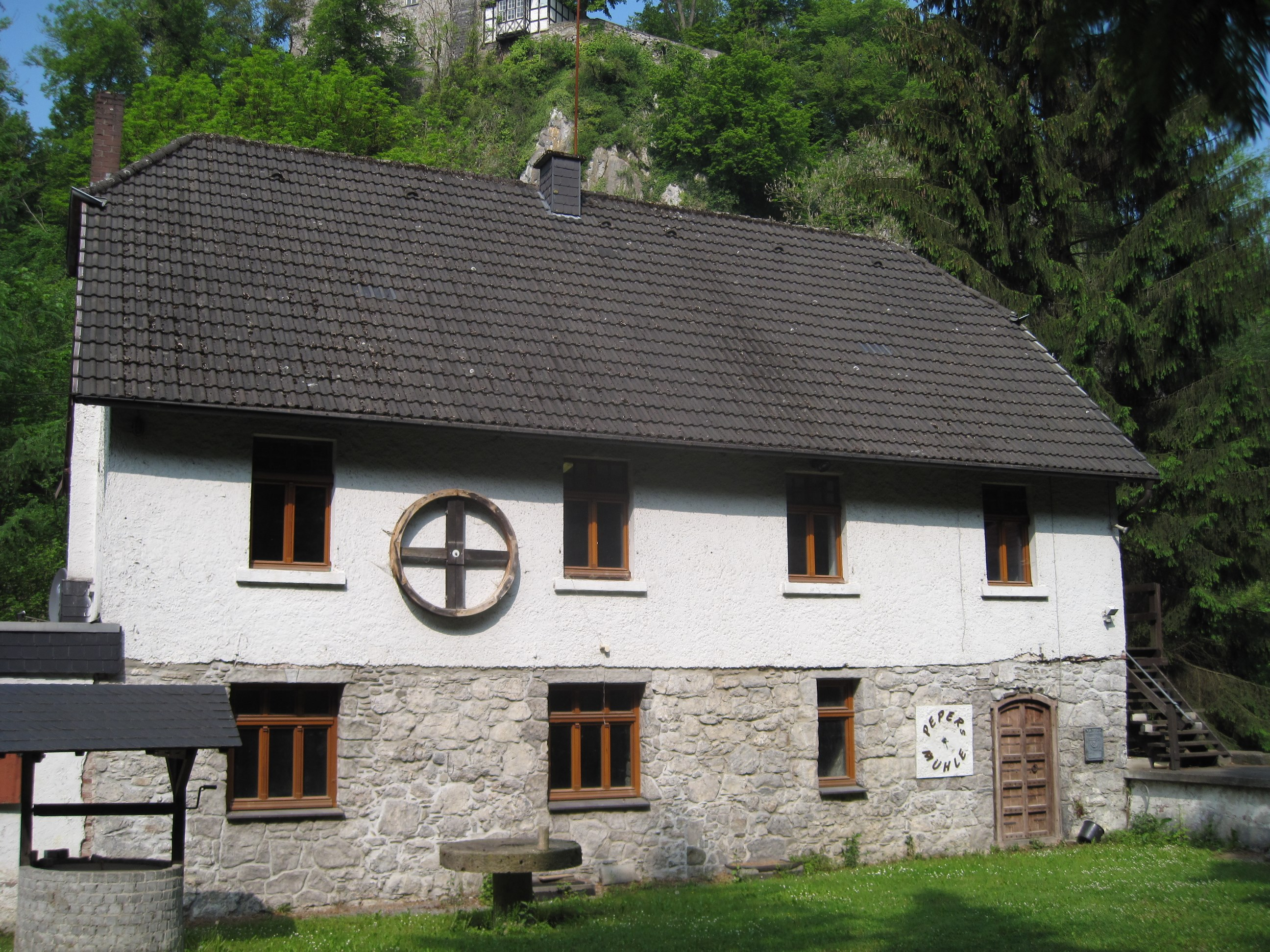 Ehemalige Mühlenanlage Klusenstein im Hönnetal in Balve. Denkmalschutz seit 25. Juni 1984.